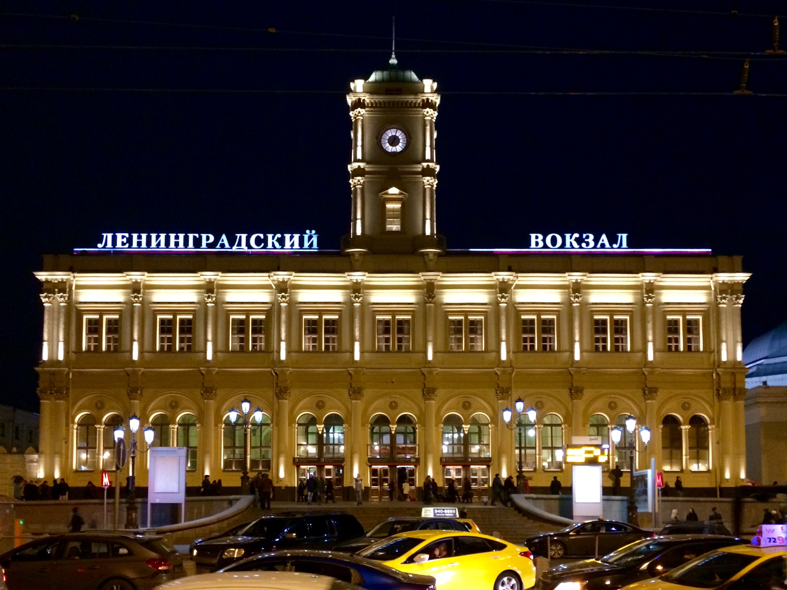 Вокзал Николаевский (Ленинградский) (Москва и Московская область, Москва, Комсомольская площадь, 1-а, 3)